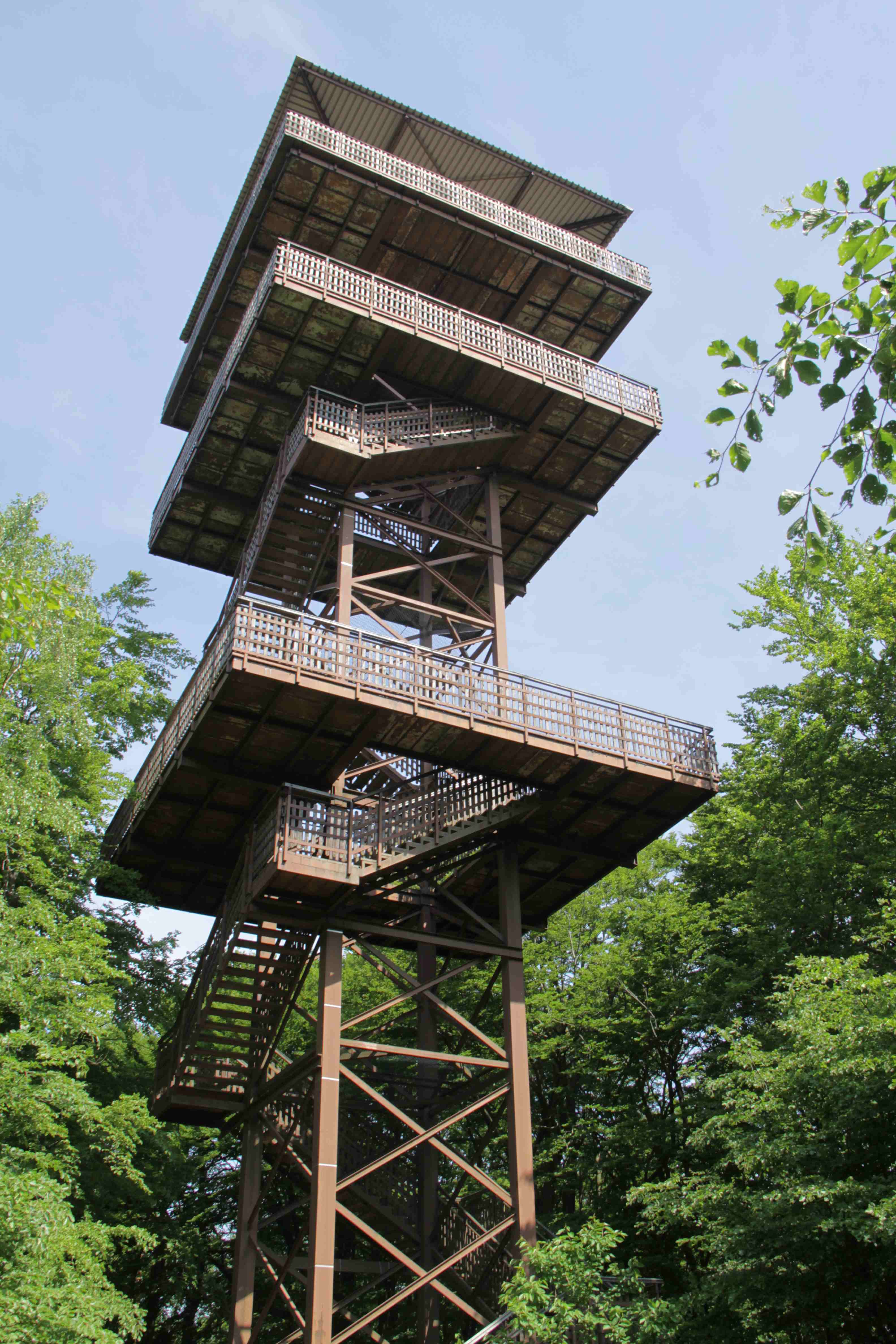 Aussichtsturm Wiezyca